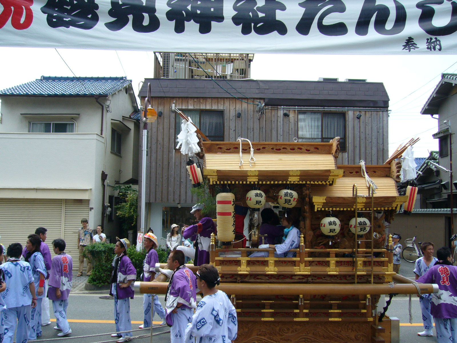 夏祭りだんじり横風景